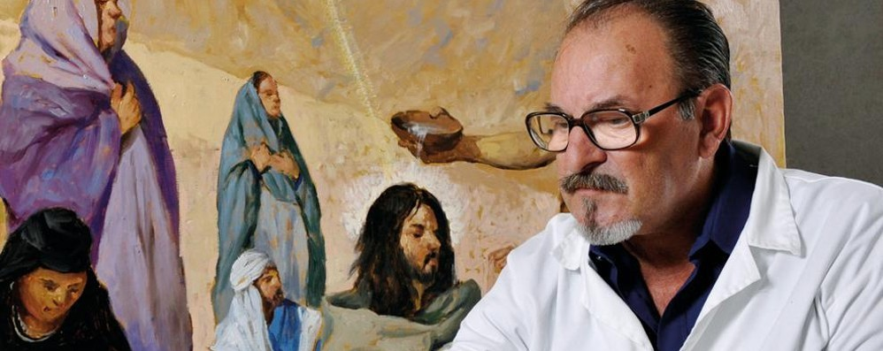 Sandro Allegretti al lavoro